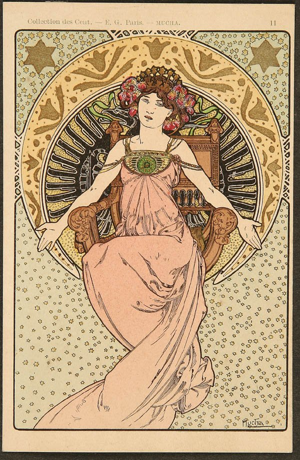 Carte postale illustrée par Alfons Mucha, Collection des cent n° 11.